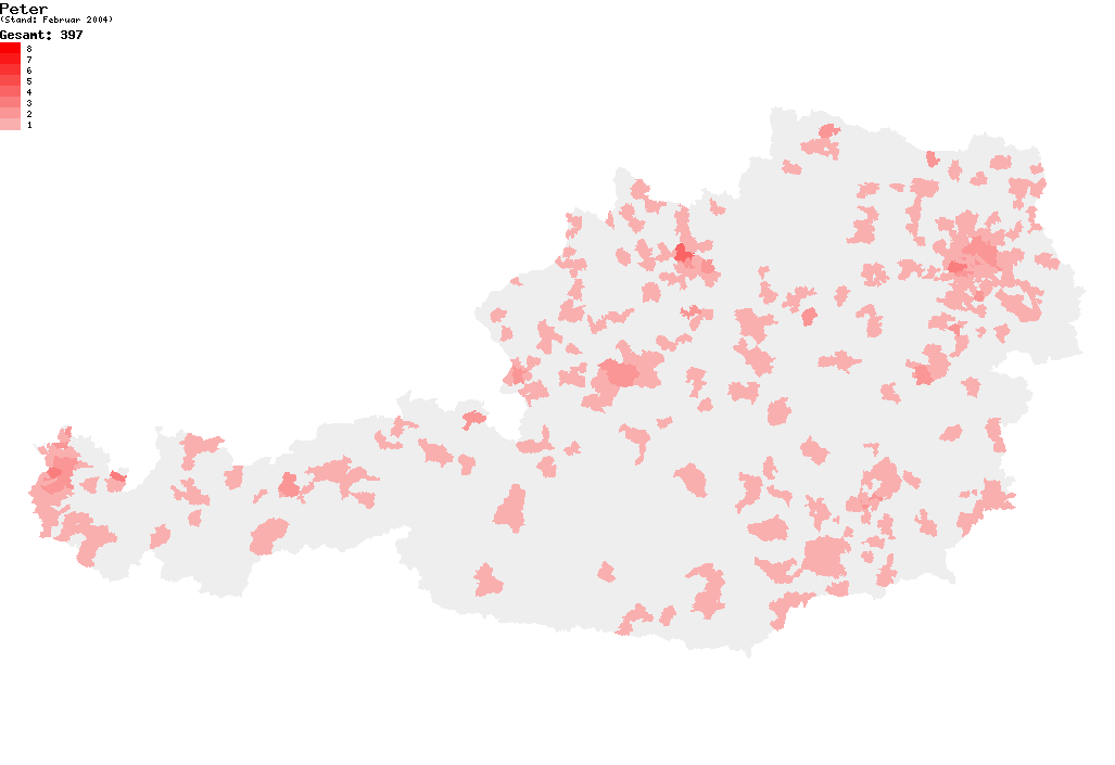 Verteilung des Nachnamens Peter in Österreich nach dem Telefonbuch mit Stand vom Februar 2004